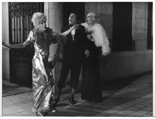 Mariquita Gallegos, Tristán y Norma Pons, en la película La guerra de los sostenes (1976)